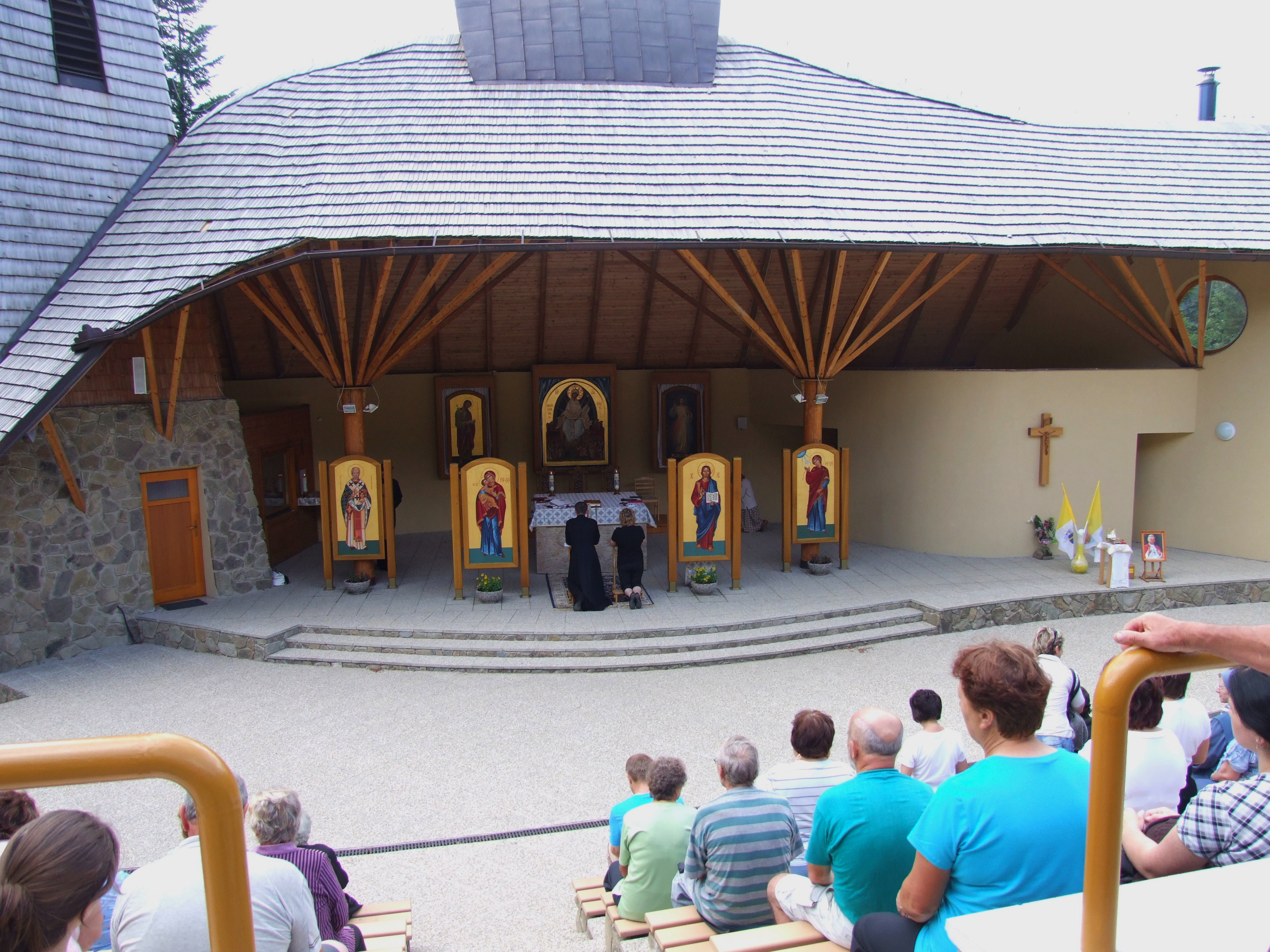 Litmanová. Różeniec do Matki Boskiej Litmanowskiej